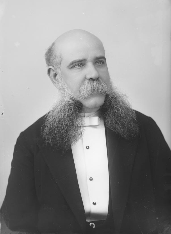 Retrat de bust del polític Francesc Rius i Taulet.